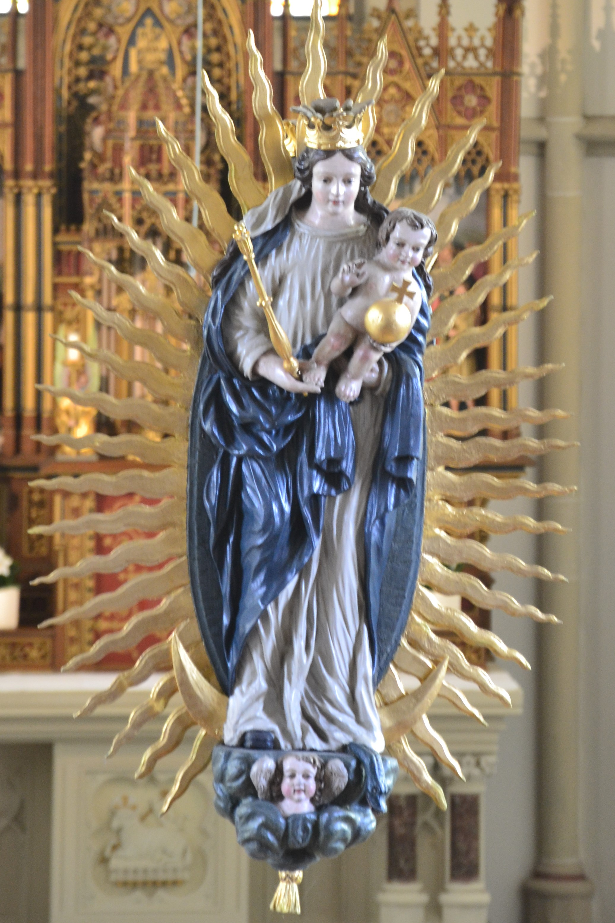 Am Übergang der Kirche vom alten zum neuen Teil hängt diese Strahlenkranz- oder Doppelmadonna, sie gehört zu den ältesten Einrichtungsgegenständen der Kirche.